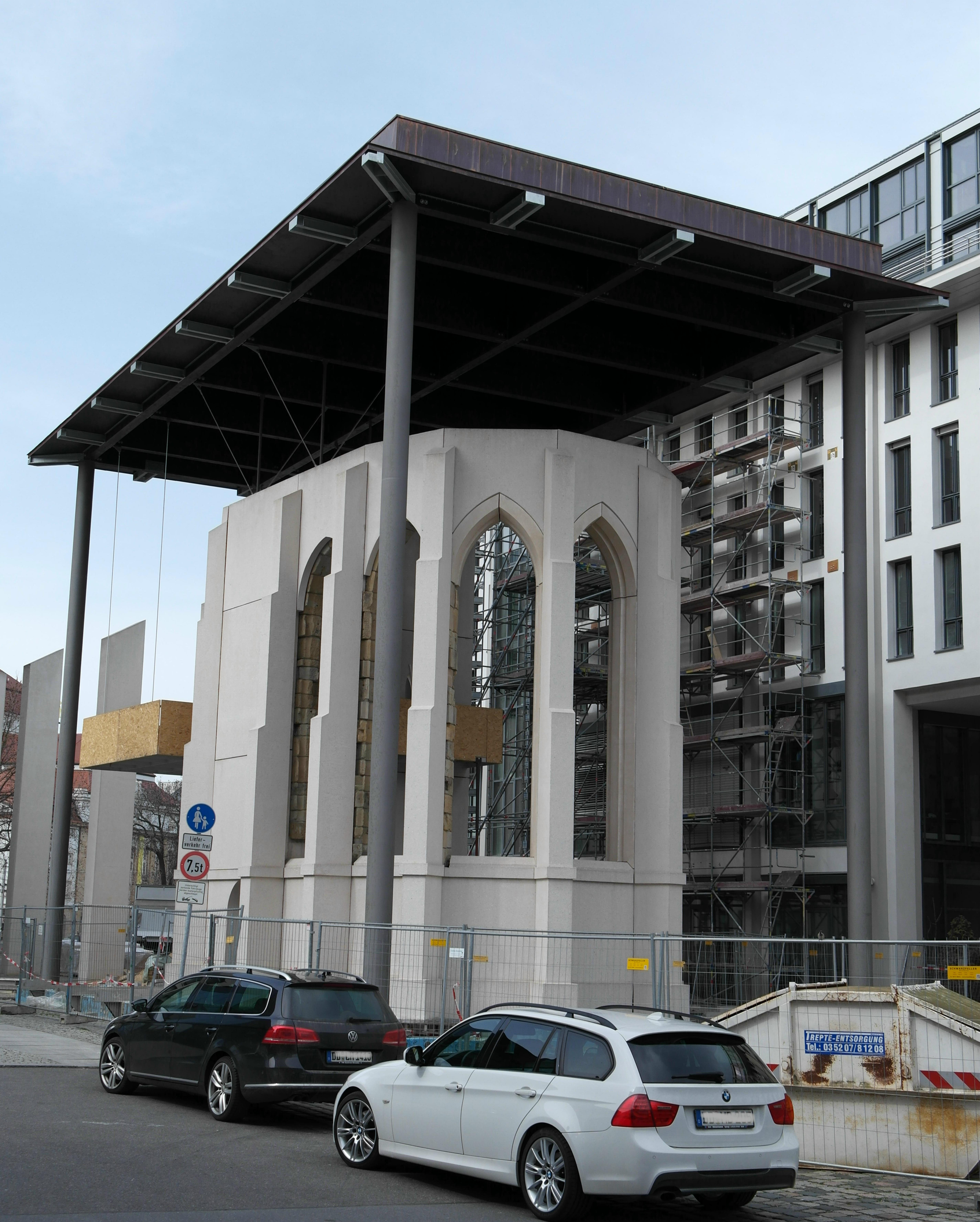 Gedenkstätte Busmannkapelle in Dresden April 2016